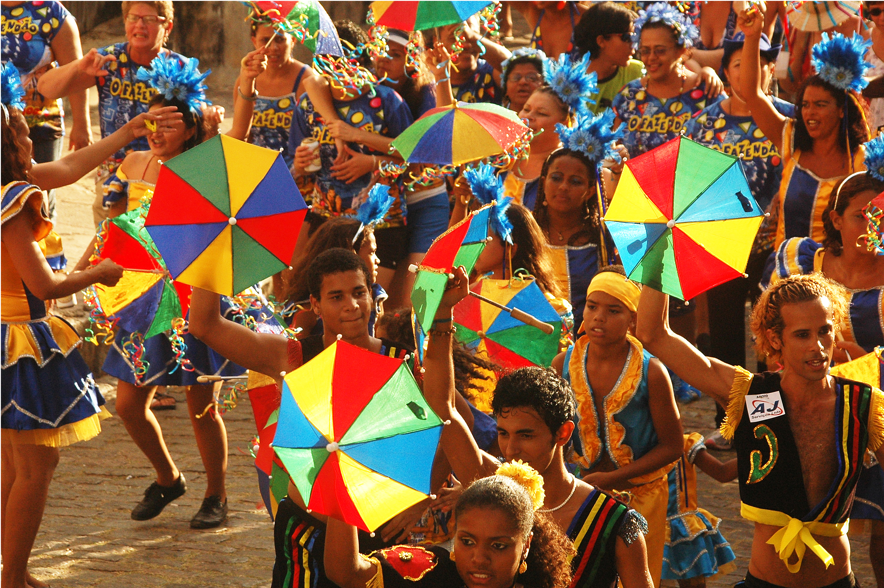 Embora nascido no Recife, é em Olinda que o frevo tem hoje a sua maior expressão. Todo ano, cerca de um milhão de pessoas vindas de todo o mundo lotam as ruas e ladeiras do Sítio Histórico da cidade em busca da efervescência e da alegria da festa. Uma folia alimentada por cerca de 500 agremiações carnavalescas locais e de outros municípios pernambucanos, que tornam o Carnaval olindense inesquecível e imperdível. Foto: Passarinho/Pref.Olinda